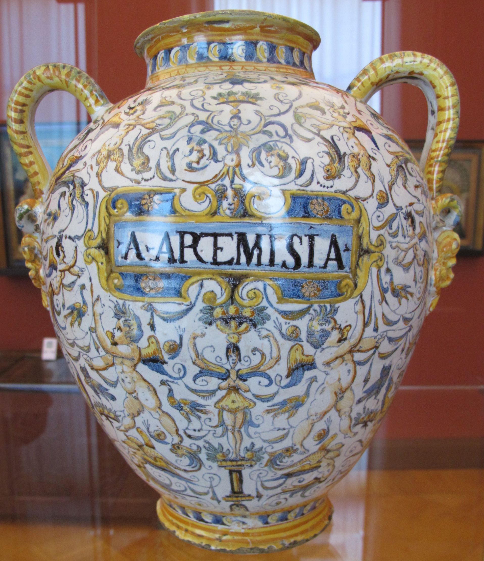 Roma, giovan paolo savino, orciolo biansato con grottesche e fogliame, 1600 ca